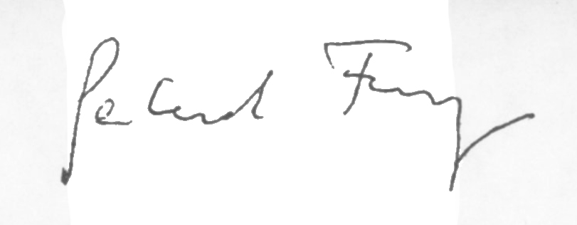 Gerhard Frey (Philosoph). Signatur beim Nachruf für ihn.